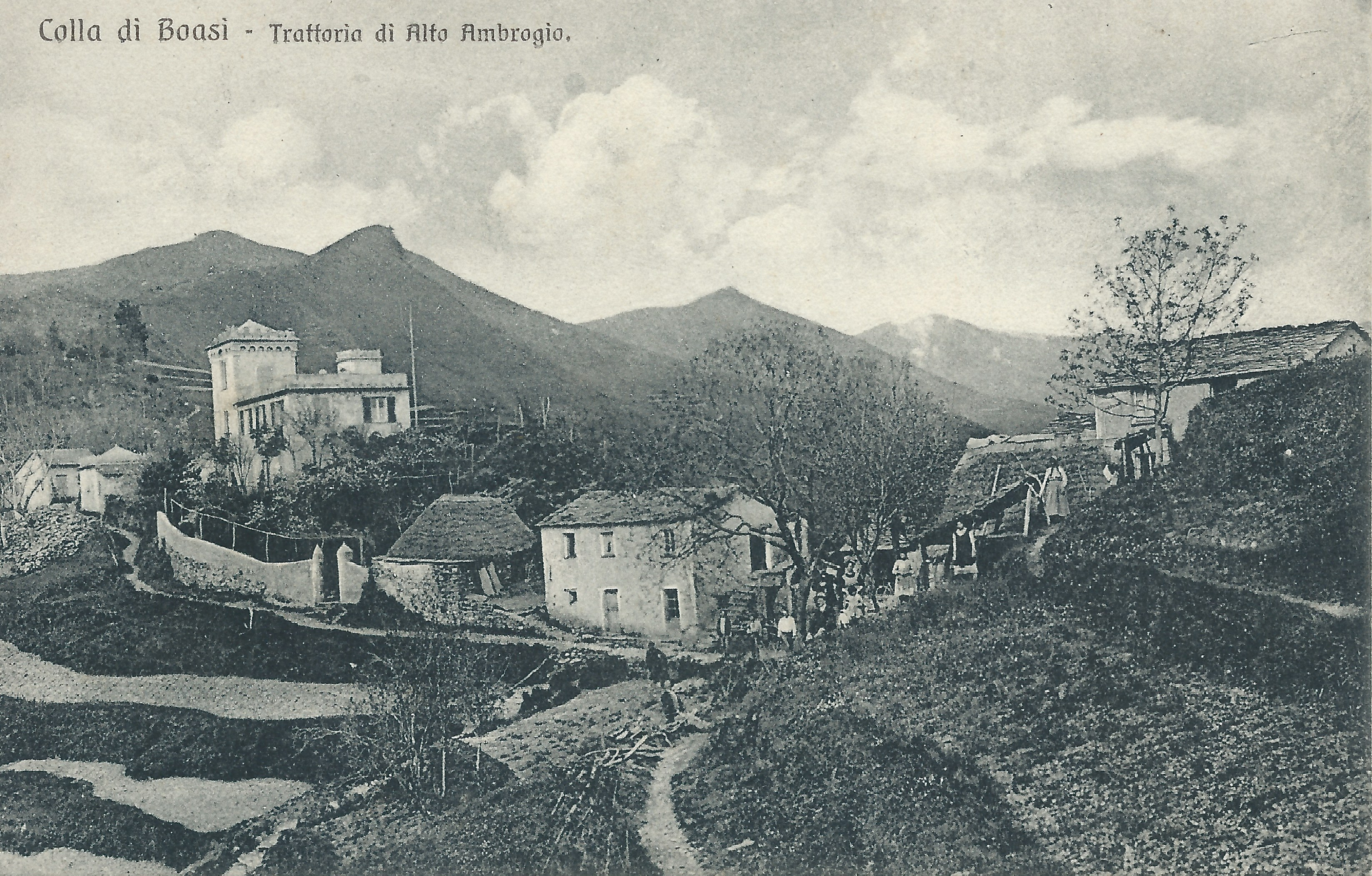 Il valico della Colla di Boasi tra le valli Fontanabuona e Bisagno nel 1920 circa